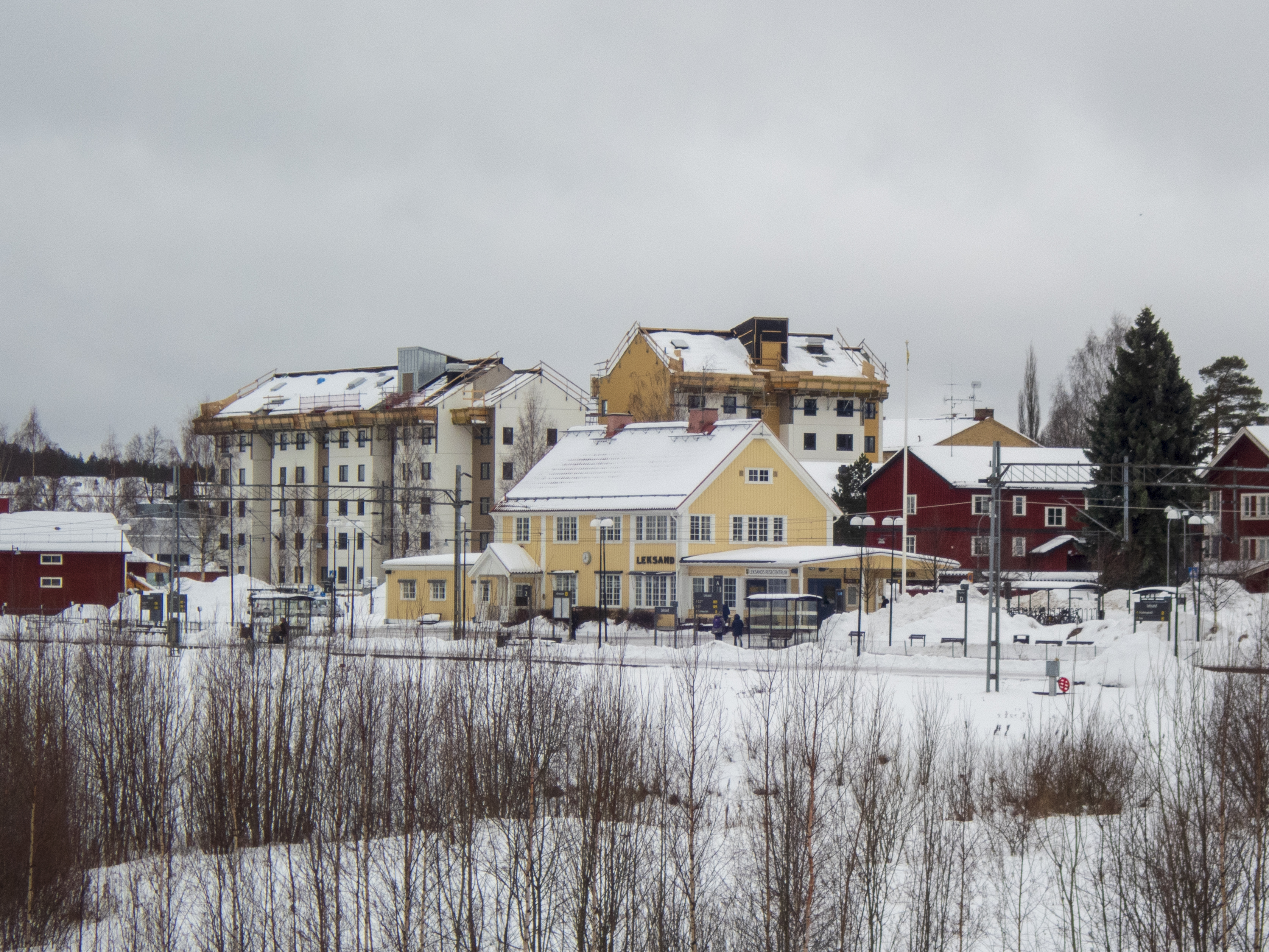 Leksands resecentrum. Järnvägsstationen invigd 1914.